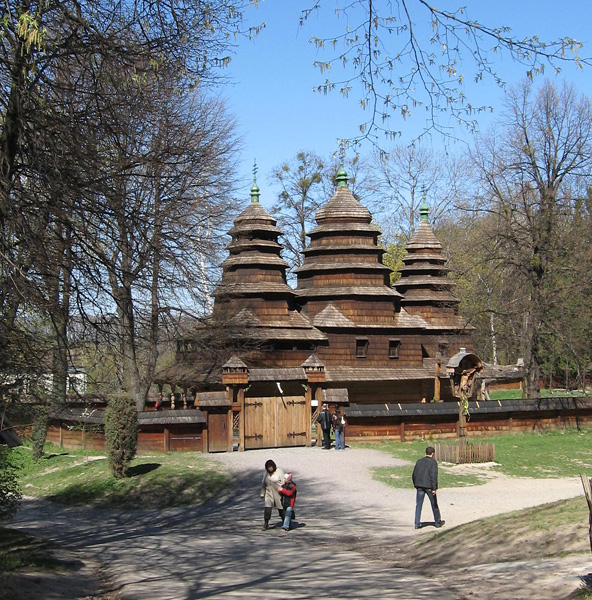 Krivka Church, Lviv